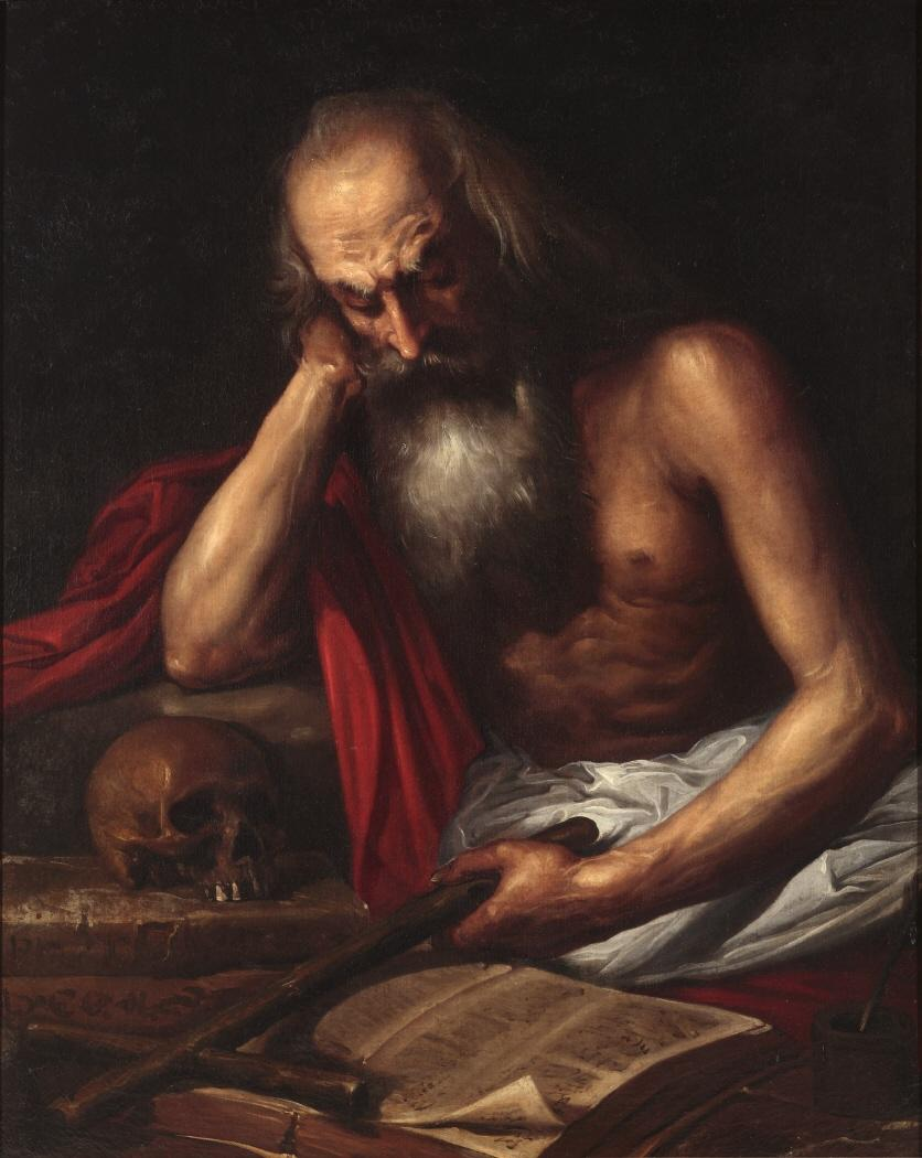 El lienzo representa a San Jerónimo de Estridón (c.340-420), uno de los cuatro Padres de la Iglesia latinos, hacienda penitencia y leyendo.